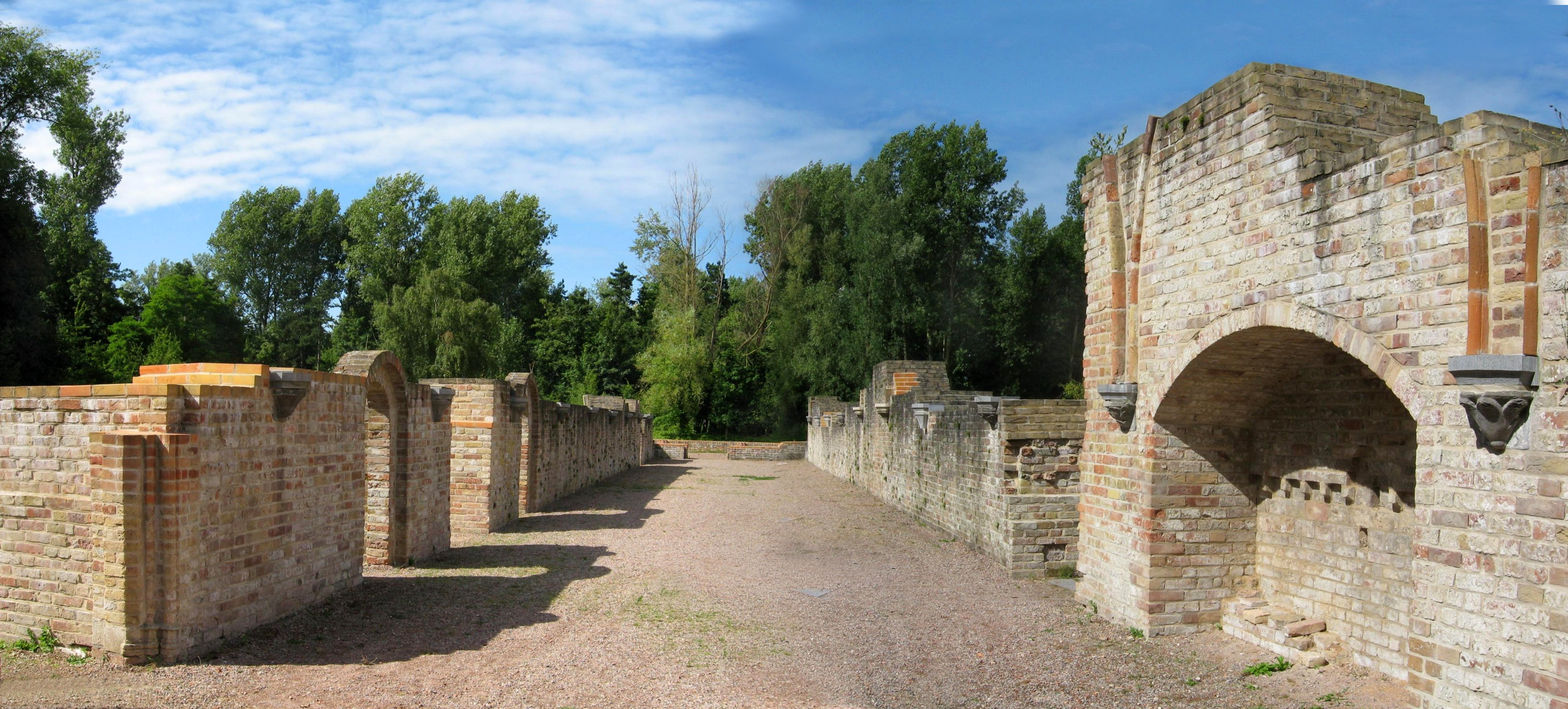 Panorama der Ausgrabungen in Koksijde